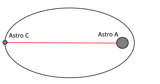 Imagem ilustrando o conceito de apoastro.